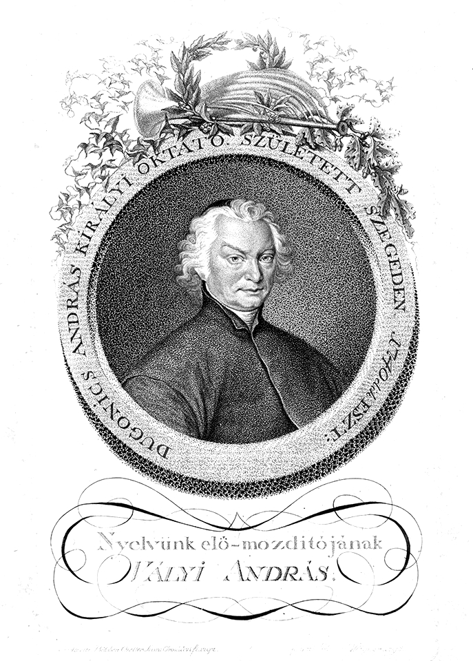 Dugonics András (Szeged, 1740. október 17. – Szeged, 1818. július 25.) piarista szerzetes, író, egyetemi tanár.